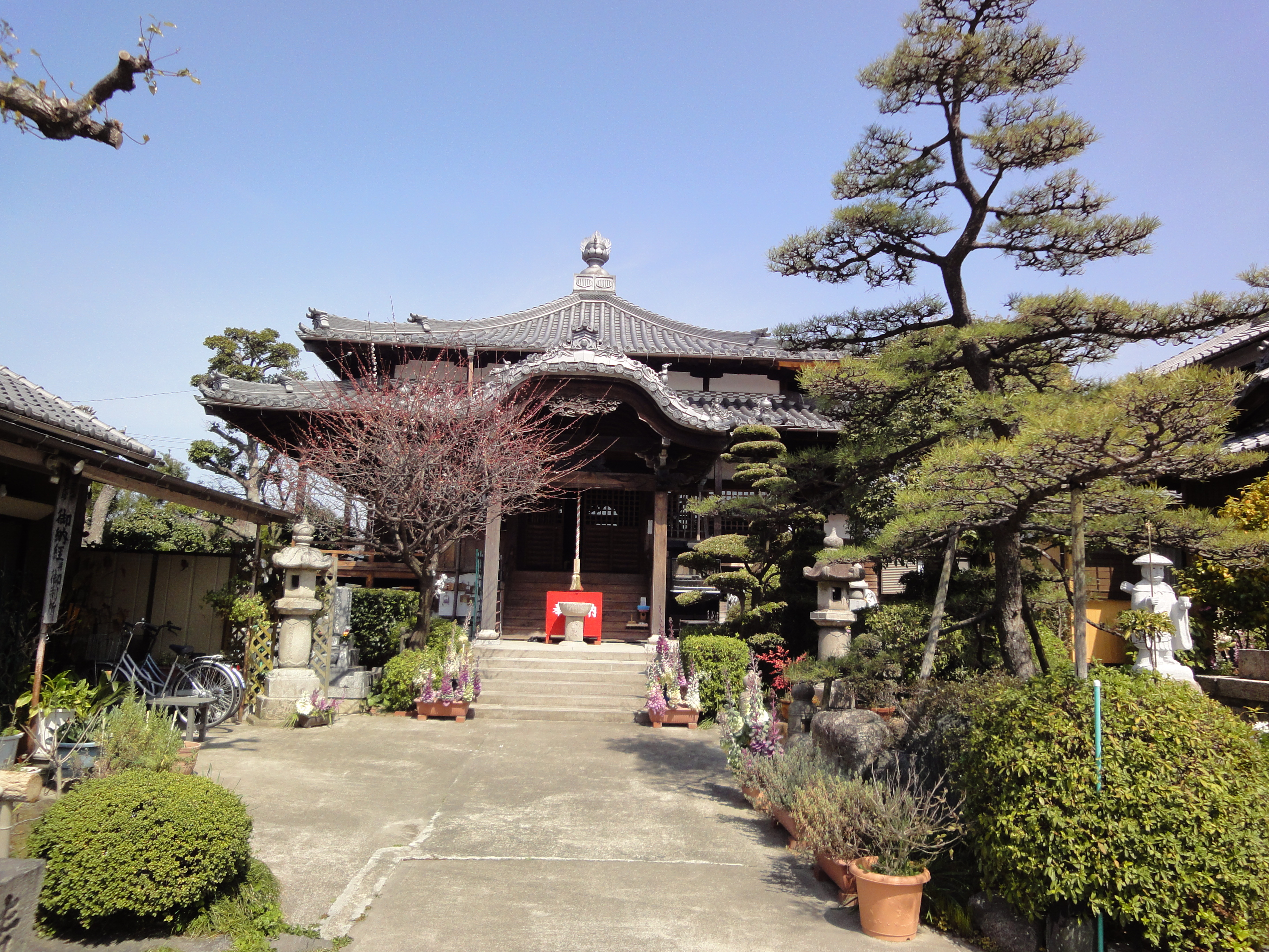 名古屋市港区多加良浦にある辯天寺